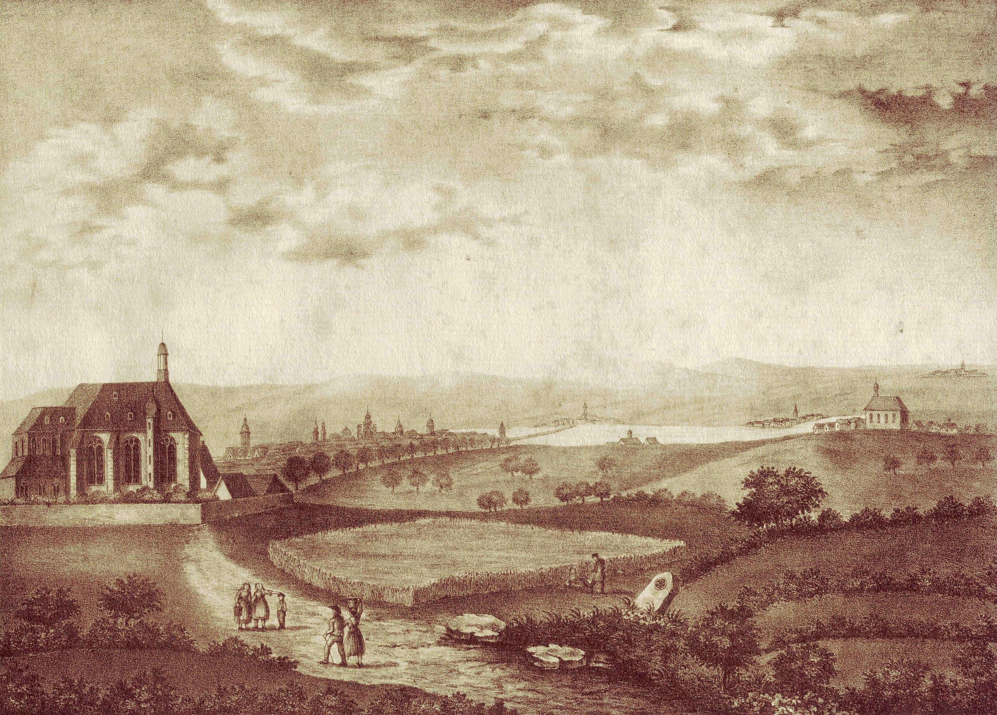 [Originalbeschreibung] Die heilige Kreuz-Kirche stand auf dem jetzt noch sogenannten heiligkreuzer Feld. Durch einen Ausfall der französischen Besatzung gegen die alliirten Deutschen, welche Mainz belagerten, wurde dieselbe am 10. Juni 1703 um 1 Uhr Nachts in Brand gesteckt und gänzlich von ihnen zerstört.